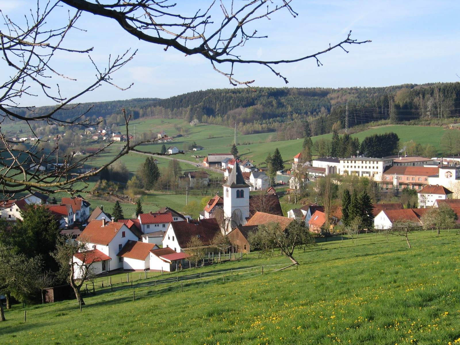 Blick vom Kirchberg nach Südwesten über die Kirche zur Ortsmitte von Ober-Mossau, Gemeinde Mossautal. Im Tal die Brauerei-Gebäude der Privat-Brauerei Schmucker